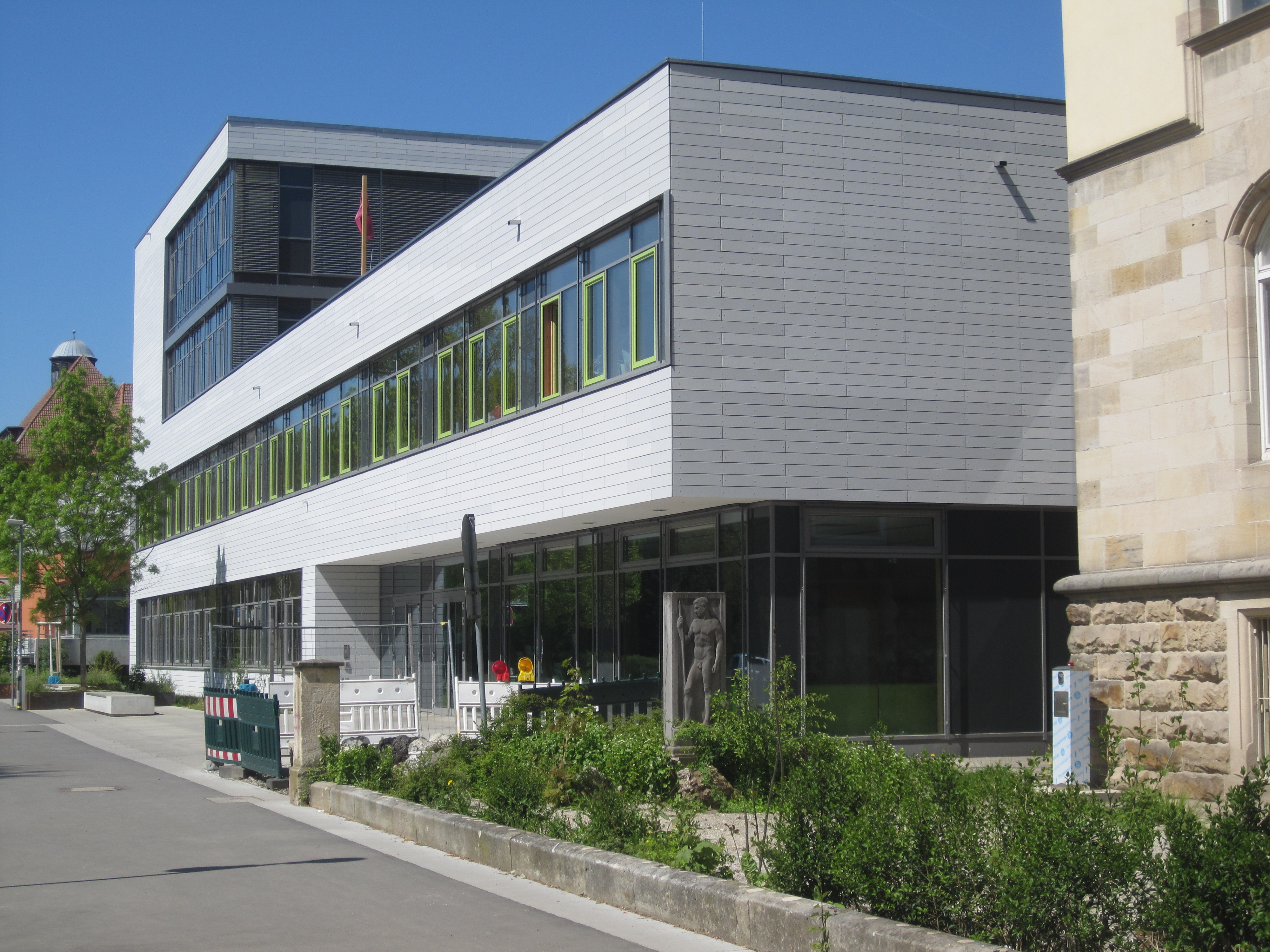 Neubau des Erweiterungsgebäude des Uhland-Gymnasiums Tübingen